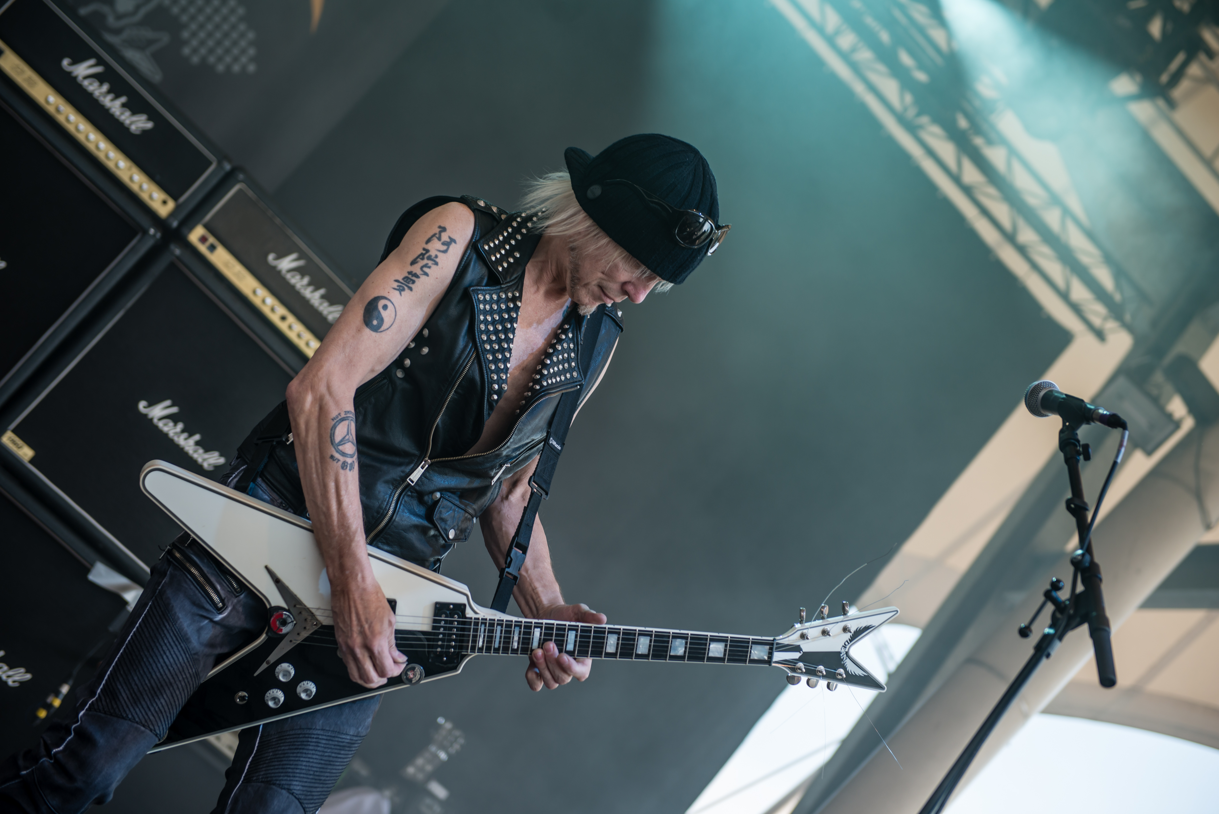 'Rock Hard Festival 2015; Gelsenkirchen Amphitheater': ' Michael Schenker's Temple of Rock'